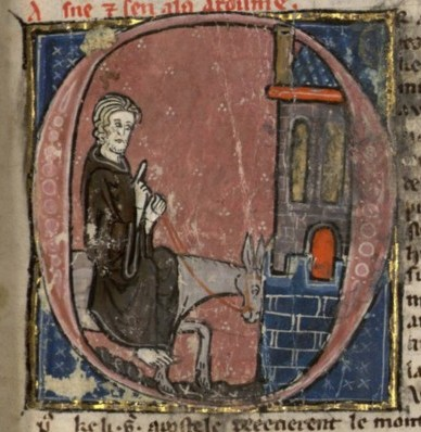 Arrivée de Pierre l'Ermite à Rome